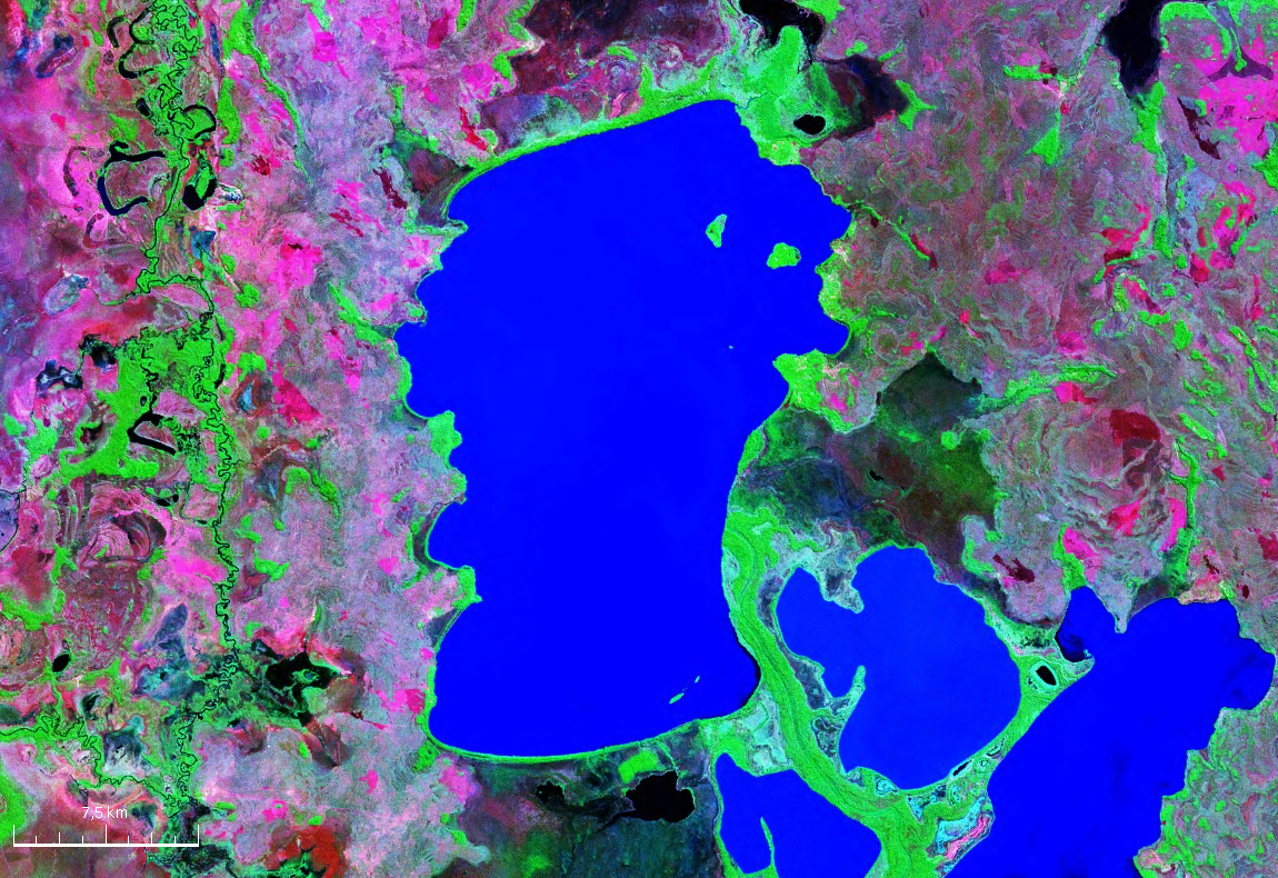 Vista satelital del lago Rogaguado ubicado al centro del departamento del Beni (Bolivia).